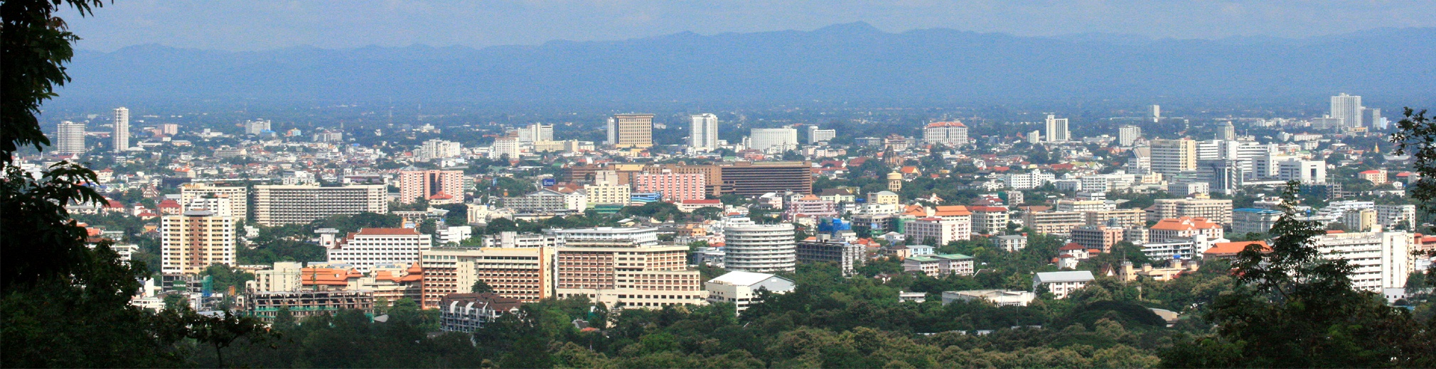 ตัวเมืองเชียงใหม่ ถ่ายจากน้ำตกวังบัวบาน